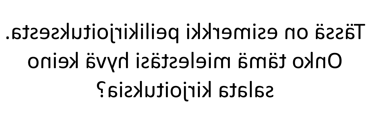 Kappale sisältää kaksi lausetta peilikirjoitusta.